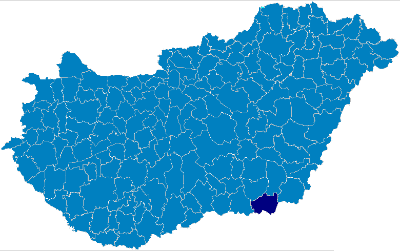 A Makói kistérség elhelyezkedése Magyarországon belül.